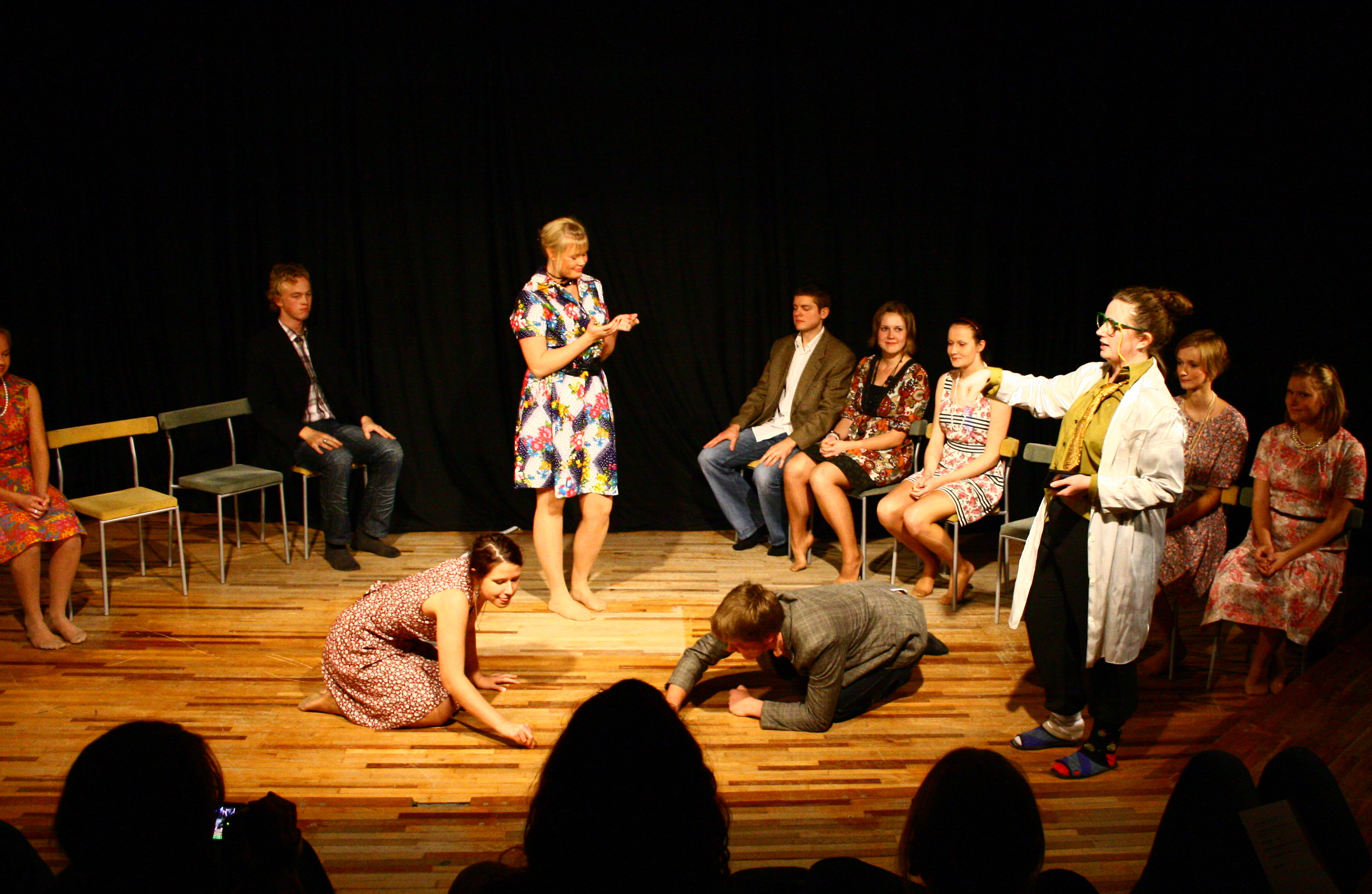 Meised ja nahed